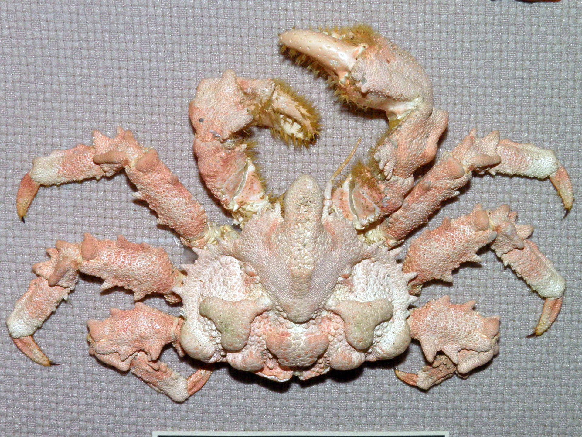 Краб Дерюгина (Sculptolithodes derjugini) в Научном музее ДВФУ (г. Владивосток)